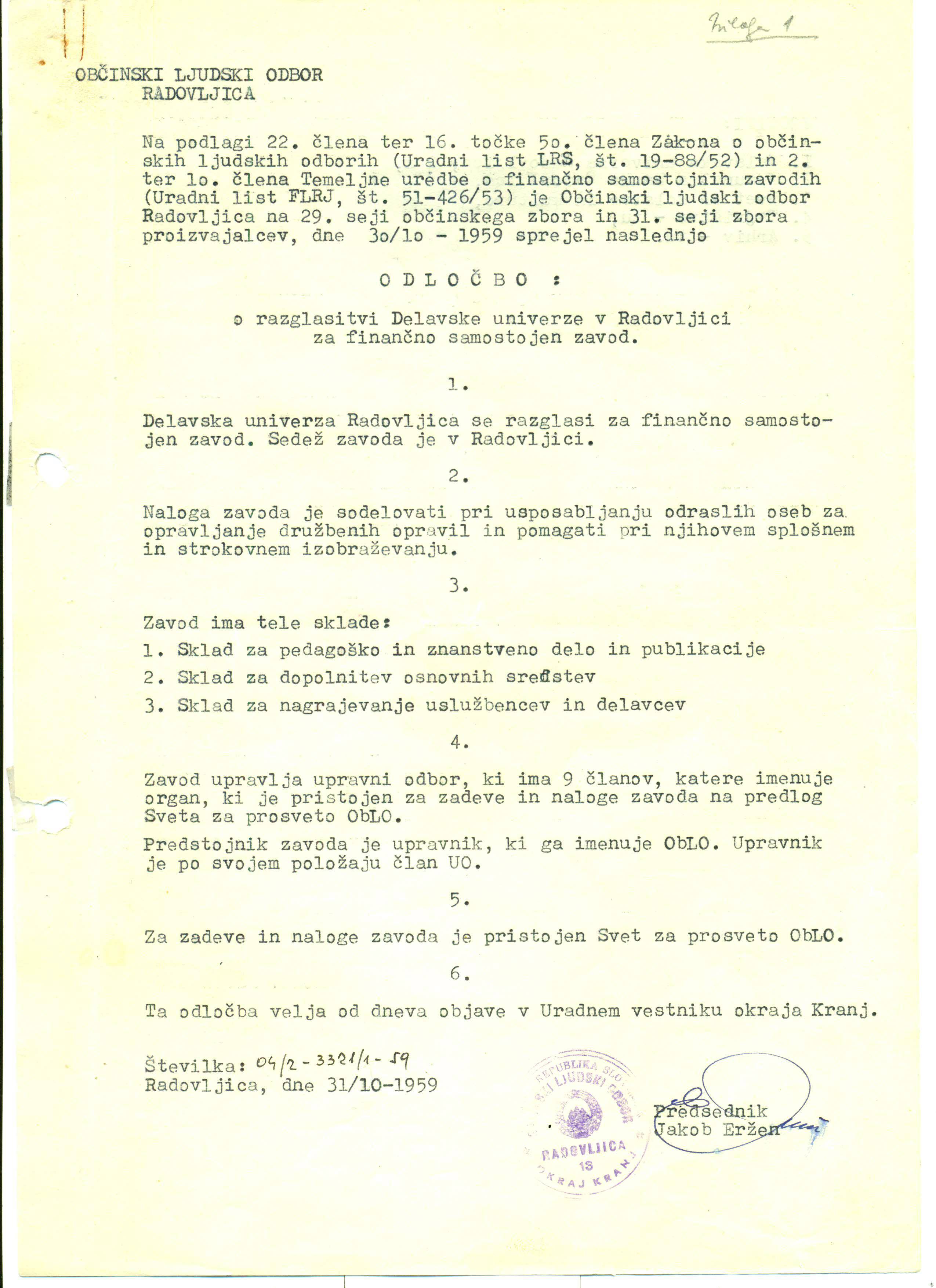 Odločba o razglasitvi Delavske univerze v Radovljici za finančno samostojen zavod (l. 1959)